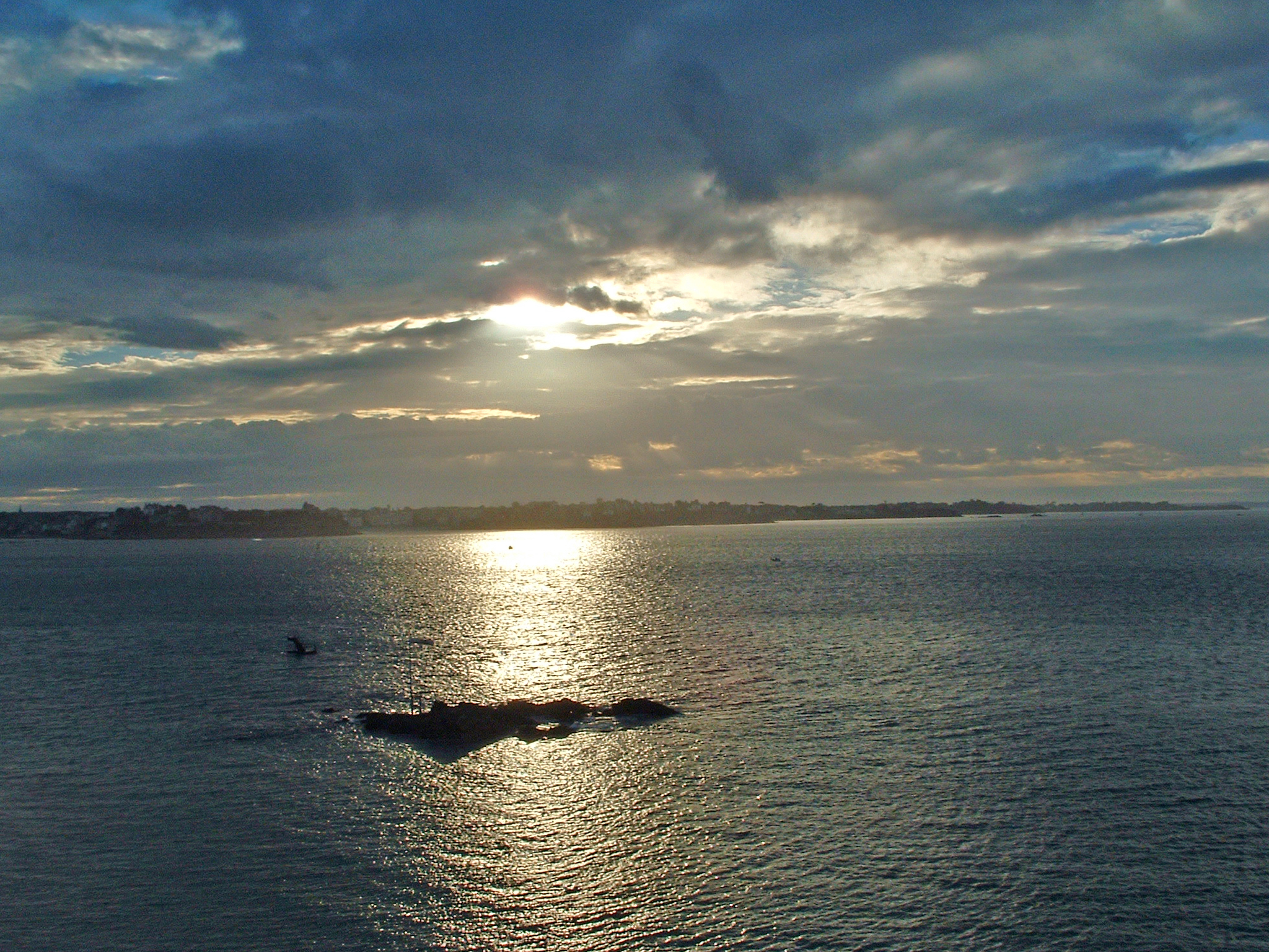 Vue de Dinard depuis les remparts de Saint-Malo par soleil couchant, au premier plan le plongeoir de la piscine d'eau de mer de Bon-Secours à marée hauteSunset on Dinard seen from Saint-Malo walls. On foreground, the diving board of Bon Secours sea waterpool